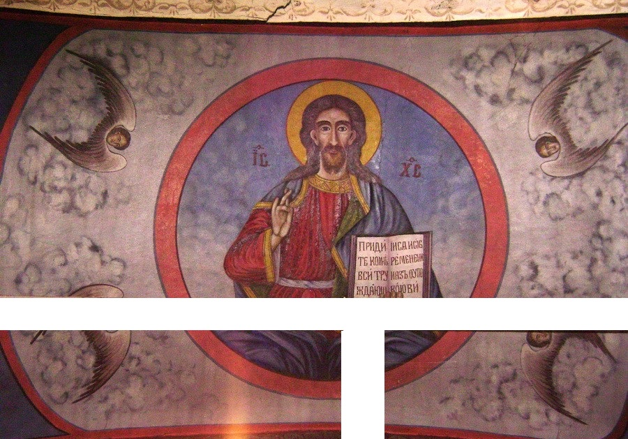 Фреска на Исус Вседржател во во црквата „Св. Никола“ во прилепско Вранче